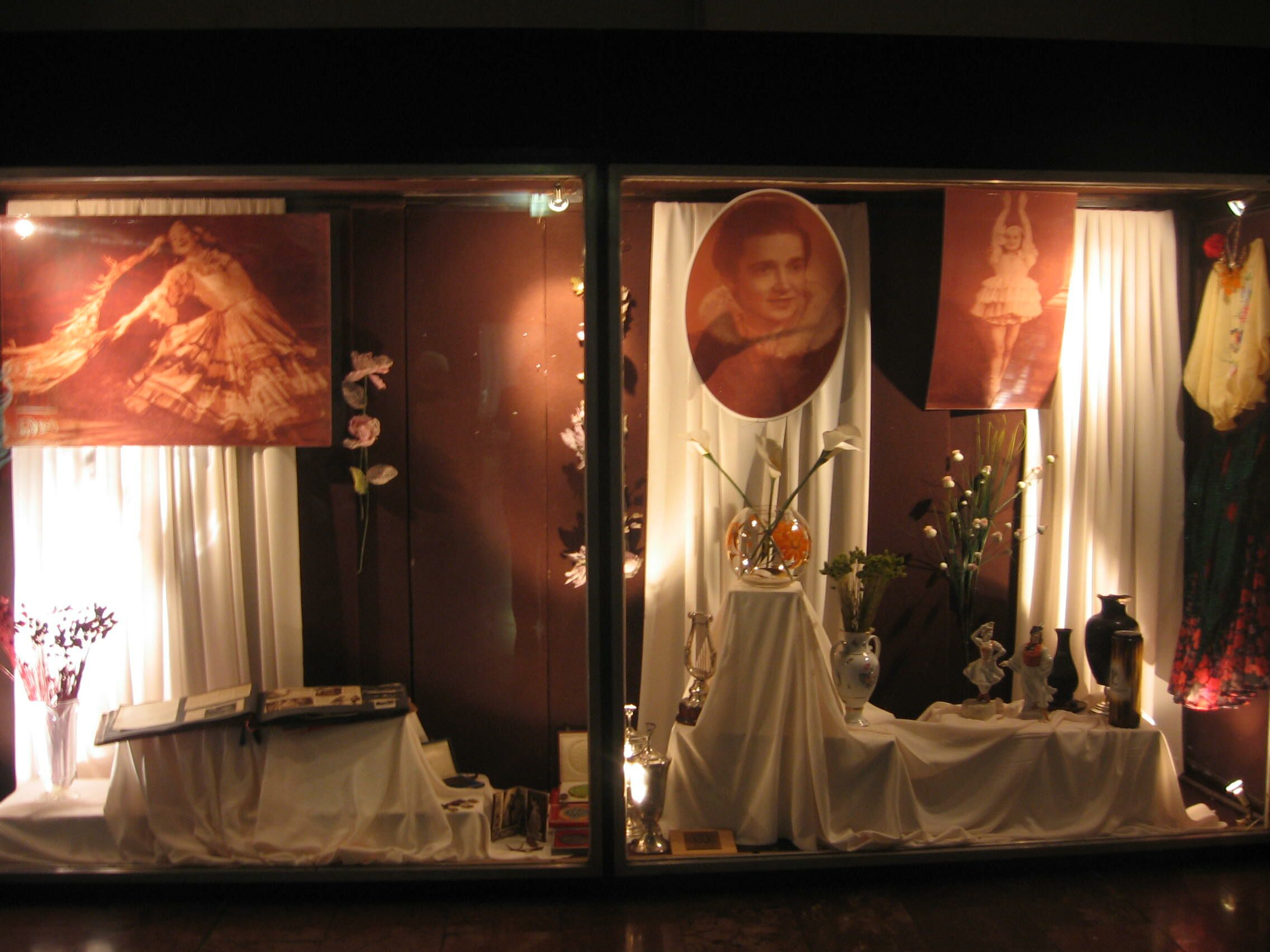 A Csiki Júlia emlékére nyílt kiállítás egy részlete, Mátészalka